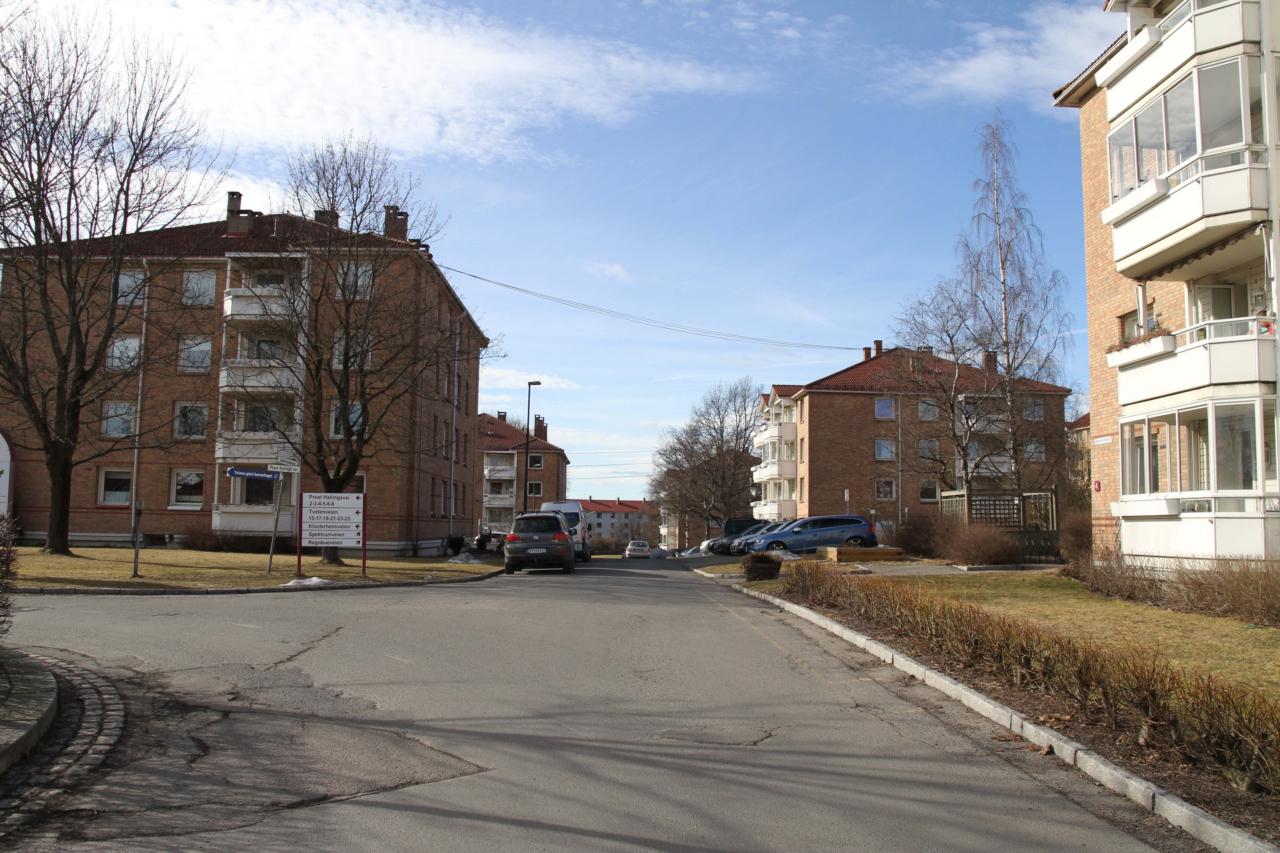 Prost Hallings vei og Spektrumveien. Teisen i Oslo.